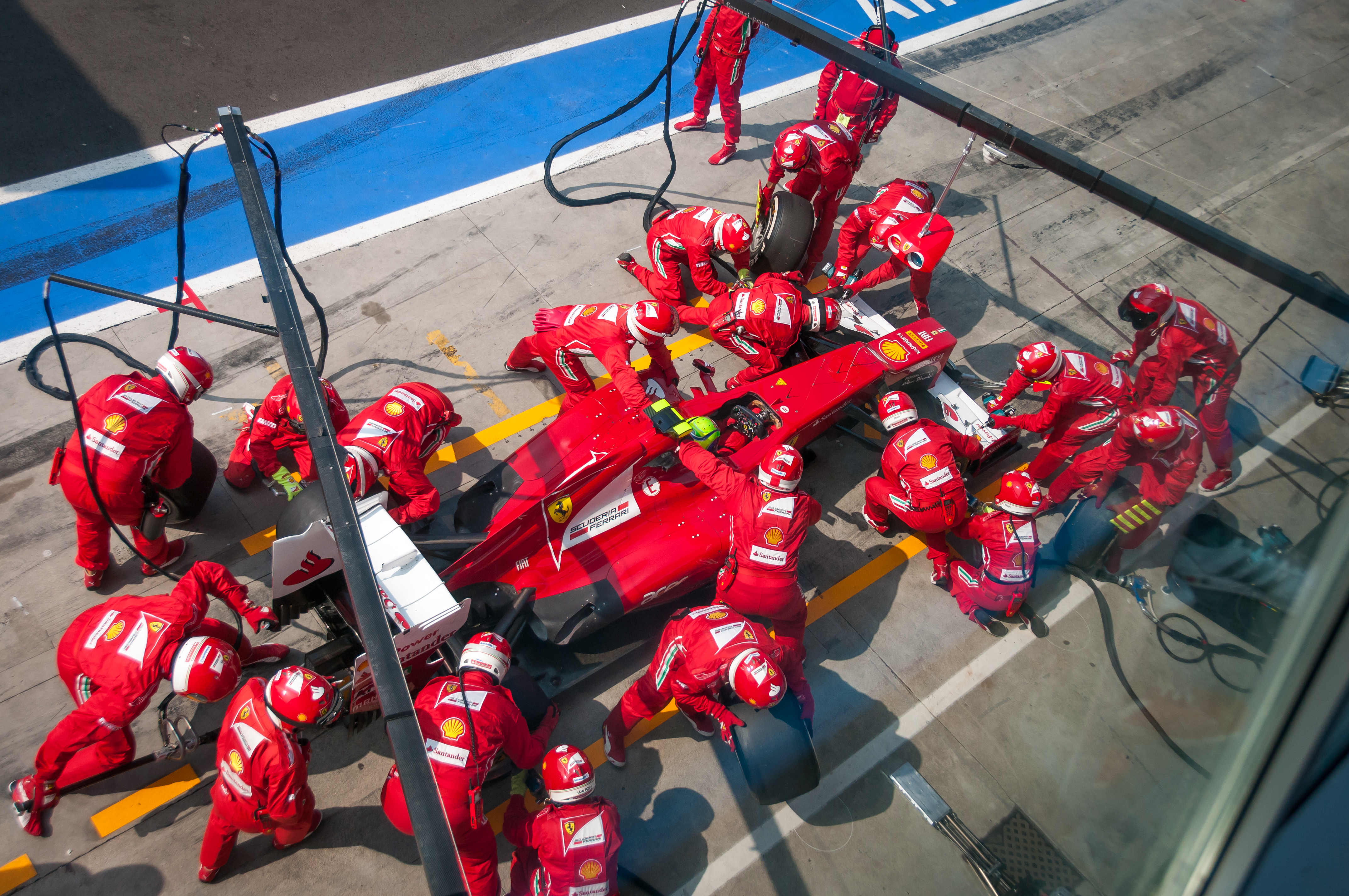 Massa stand monza 2012